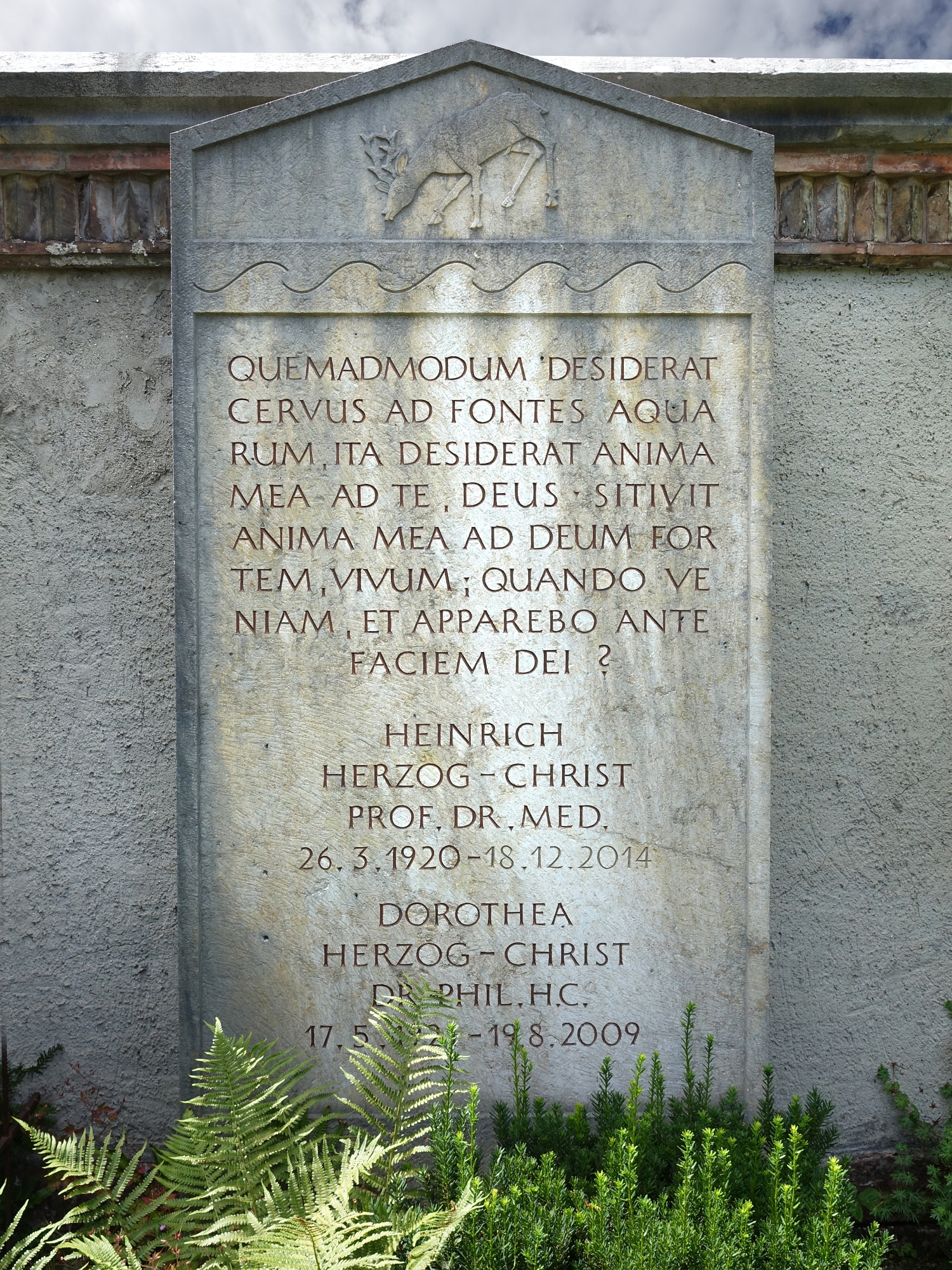 Dorothea Herzog-Christ (1921–2009) Kunsthistorikerin, Kunstkritikerin, Autorin. Heinrich Herzog-Christ (1920–2014), Internist, Pneumologe und Hochschullehrer. Grab auf dem Friedhof Wolfgottesacker, Basel Grabinschrift: QUEMADMODUM DESIDERAT CERVUS AD FONTES AQUA RUM, ITA DESIDERAT ANIMA MEA AD TE, DEUS. SITIVIT ANIMA MEA AD DEUM FORTEM, VIVUM ; QUANDO VENIAM, ET APPAREBO ANTE FACIEM DEI ? Wie der Hirsch nach frischer Quelle schreit mit lechzender Begier, also schreit auch meine Seele voll Verlangen, Gott, nach dir. Nur nach dir, lebend'ger Gott, dürstet sie in ihrer Not. Ach, wann wird es doch geschehen, dass ich kann dein Antlitz sehen?